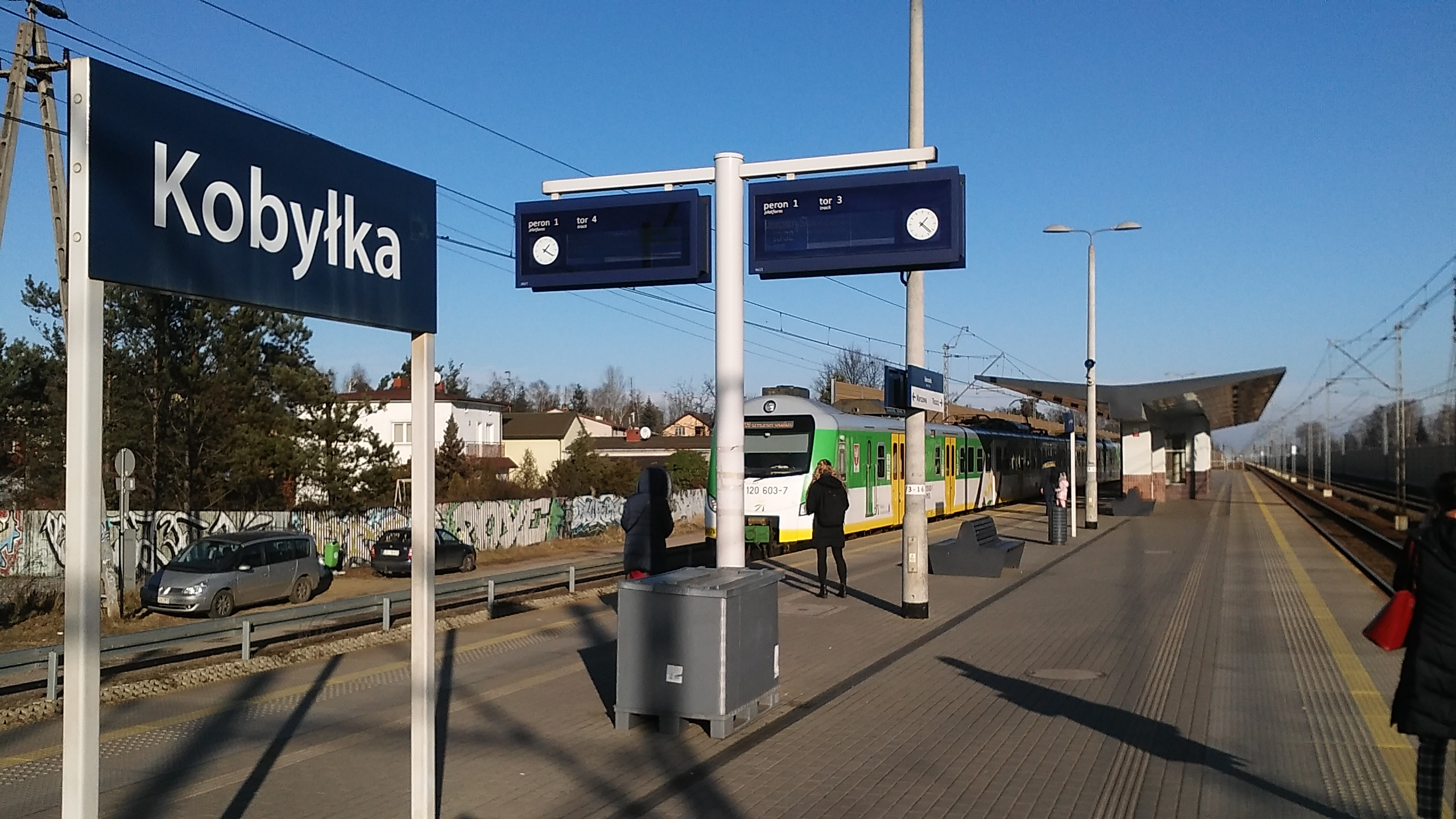 przystanek kolejowy Kobyłka - peron i pociąg osobowy Kolei Mazowieckich KM 10256 relacji Wołomin Słoneczna - Warszawa Wileńska